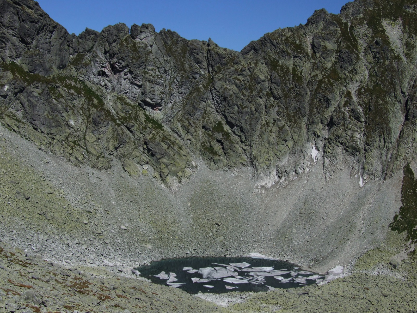 Kolisty Staw i Szyczyrbska Przełęcz w Dolinie Młynickiej (22 sierpnia 2008)